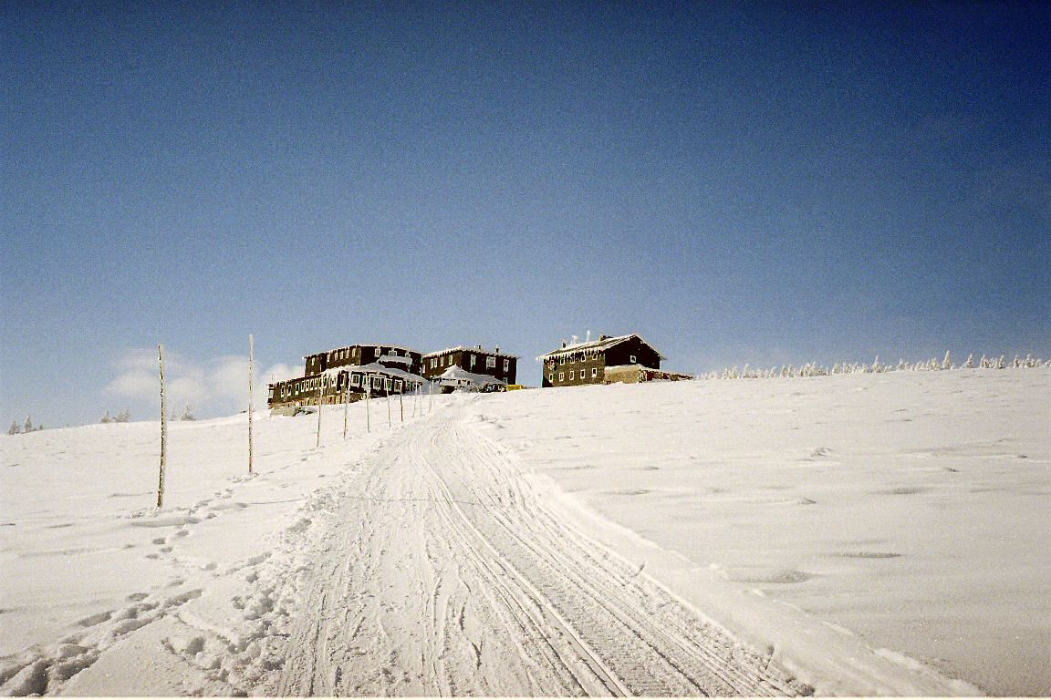 Schronisko Petrova Bouda, w okolicy Hutniczego Grzbietu, po czeskiej stronie Karkonoszy. Styczeń 2005.